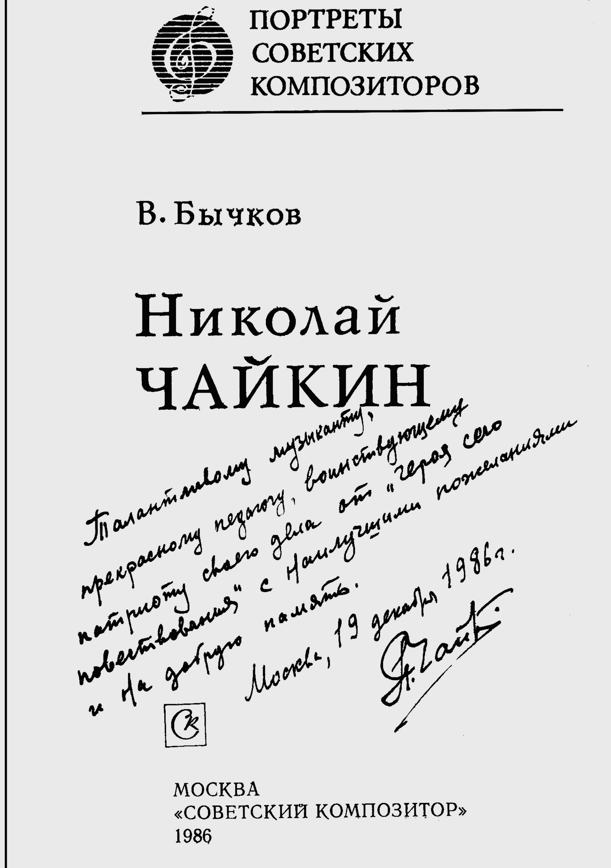 Портреты советских композиторов: Н.Чайкин